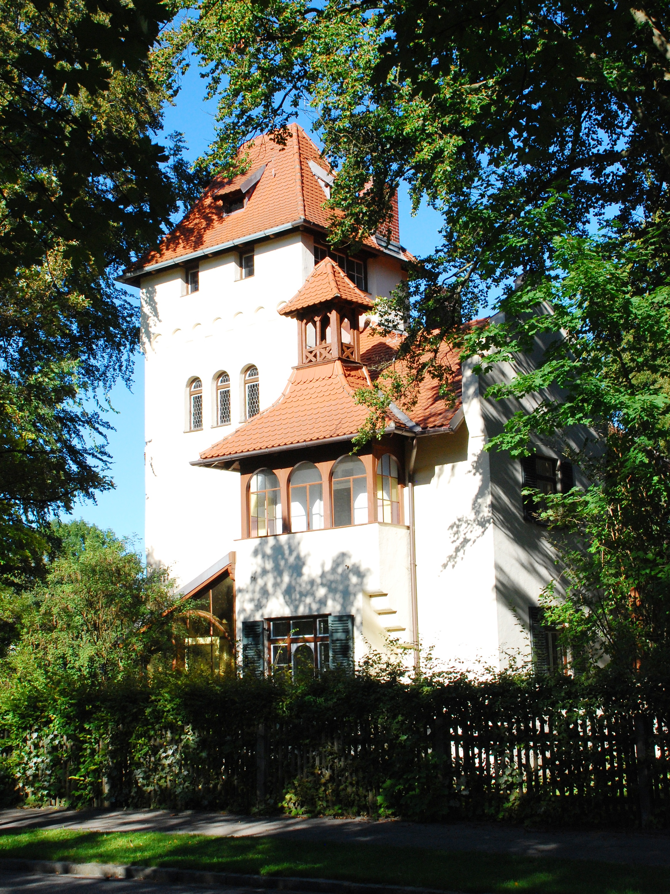 Haus in der Steinkirchner Straße 13 in Gräfelfing, Landkreis München, Regierungsbezirk Oberbayern, Bayern. Als Baudenkmal in der Bayerischen Denkmalliste aufgeführt. Laut Denkmalliste um 1905 vom Architekten Stadler erbaut.